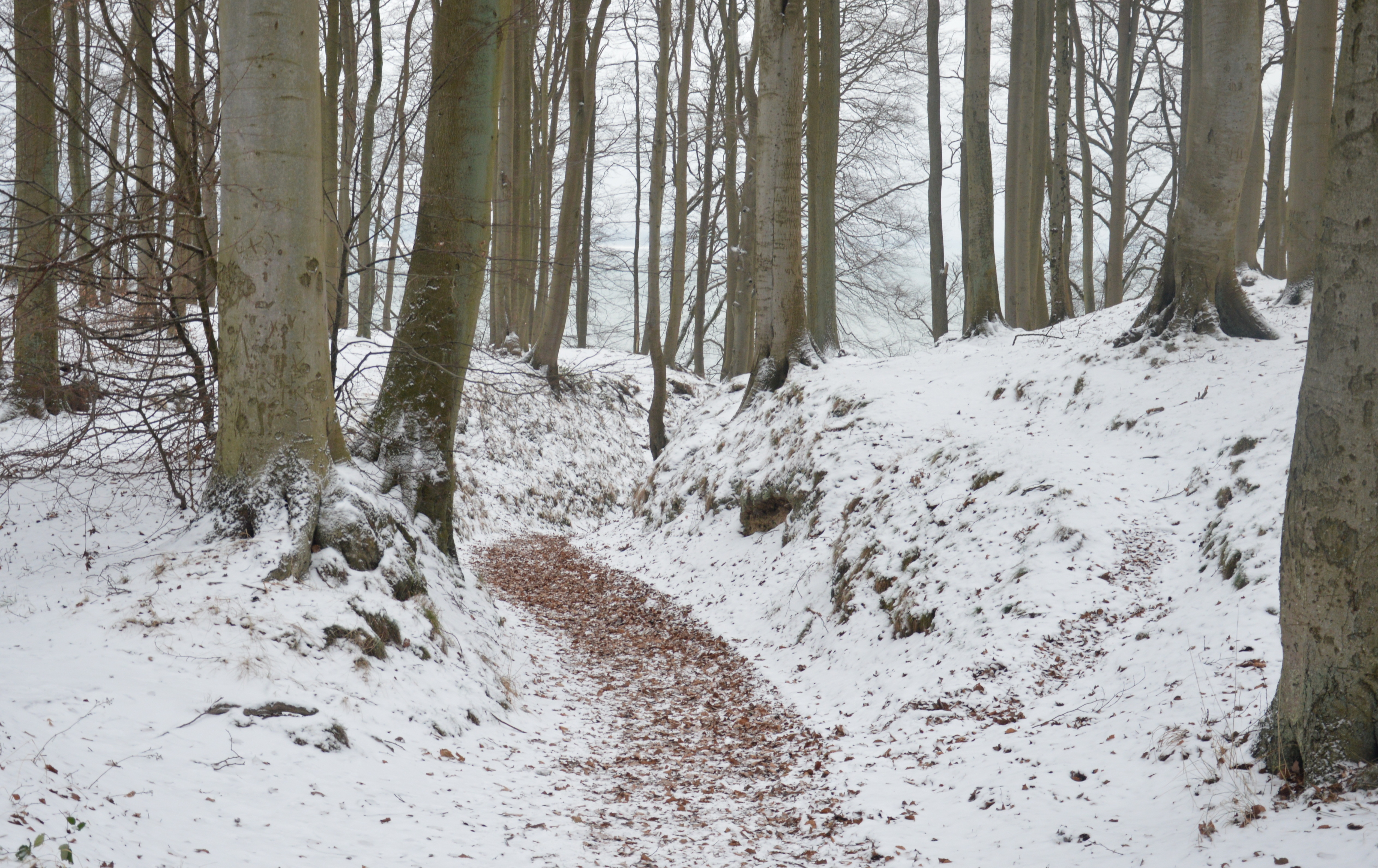 Oberer Eingang zur Teufelsschlucht in der Granitz bei Binz.